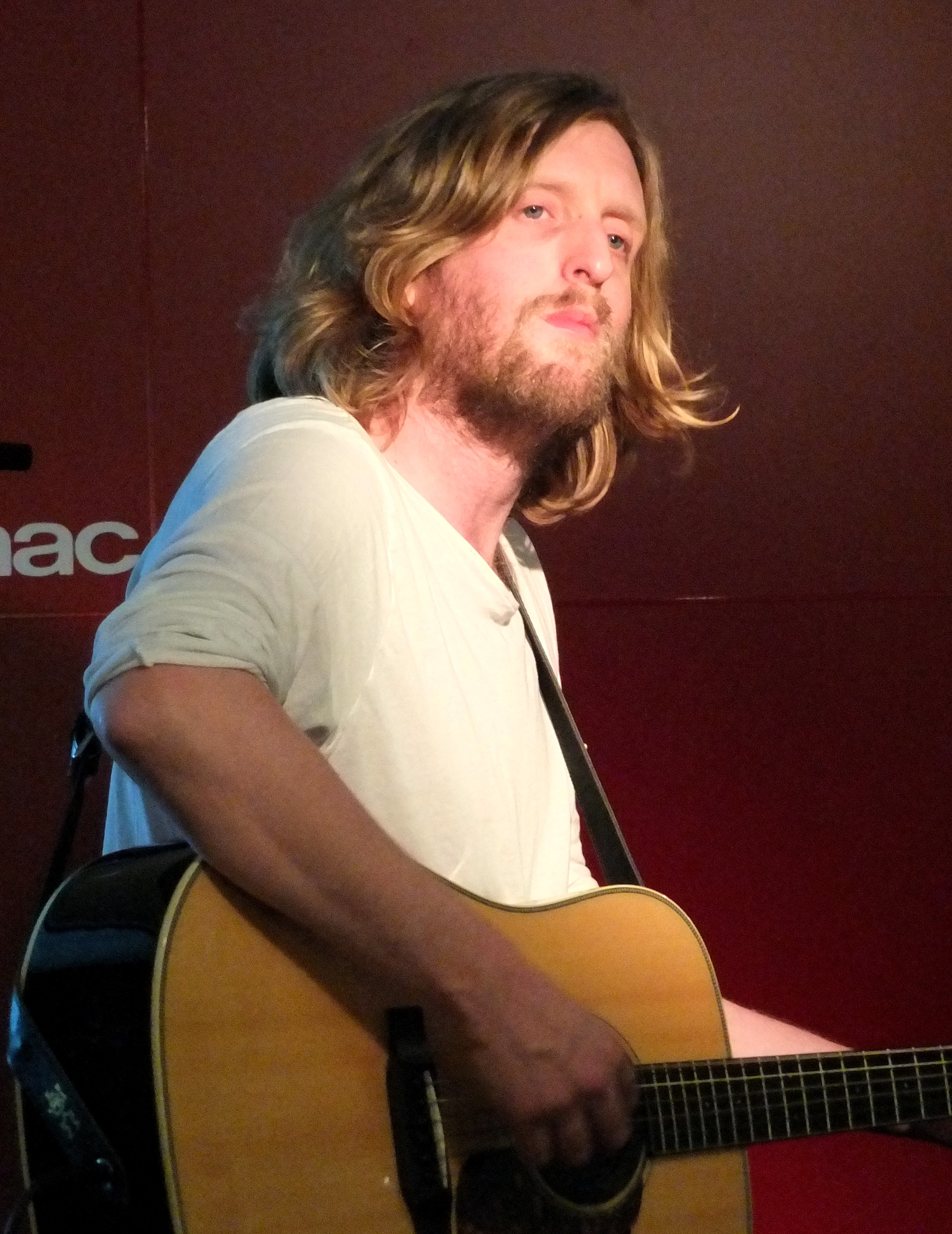 Andy Burrows, à la FNAC des Ternes (Paris, 17e arrond), lors d'un showcase pour la présentation de son album Company, le 28 novembre 2012.